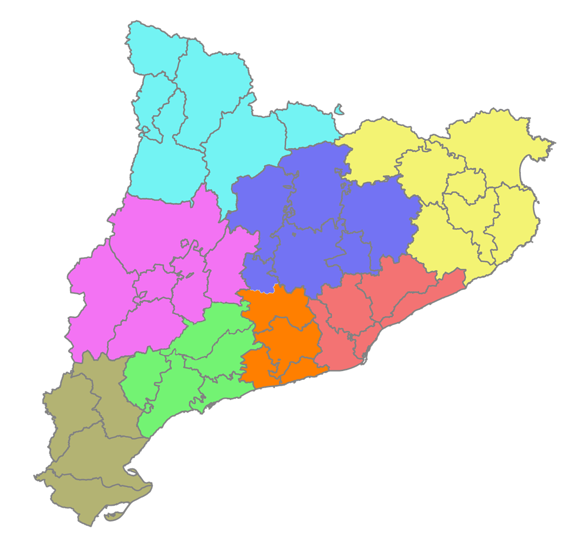 Àmbits del Pla Territorial de Catalunya, 2016 Àmbit metropolità Camp de Tarragona Penedès Comarques Centrals Ponent Comarques Gironines Alt Pirineu i Aran Terres de l'Ebre